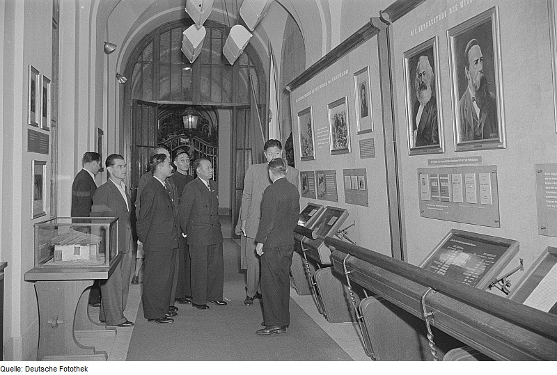 Original image description from the Deutsche FotothekChinesische Delegierte im Georgi-Dimitroff-Museum (heutiges Bundesverwaltungsgericht)